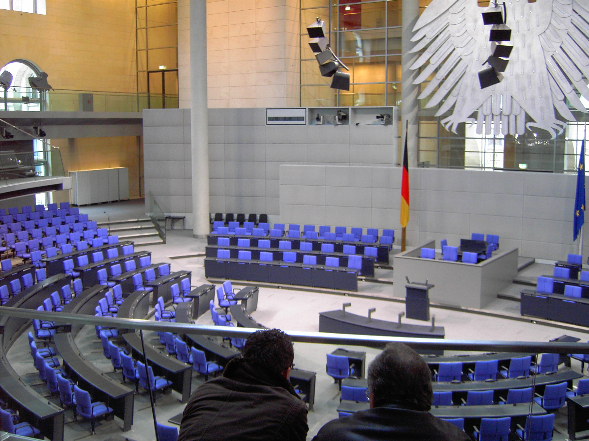 Plenarsaal des deutschen Bundestages 2006